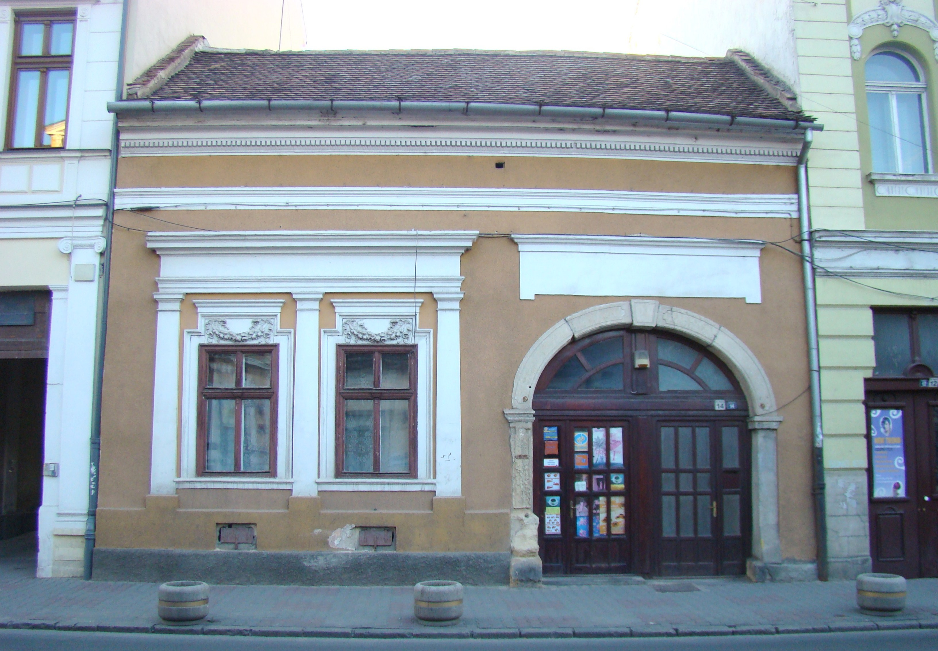 Clădire monument istoric, str. Napoca 14